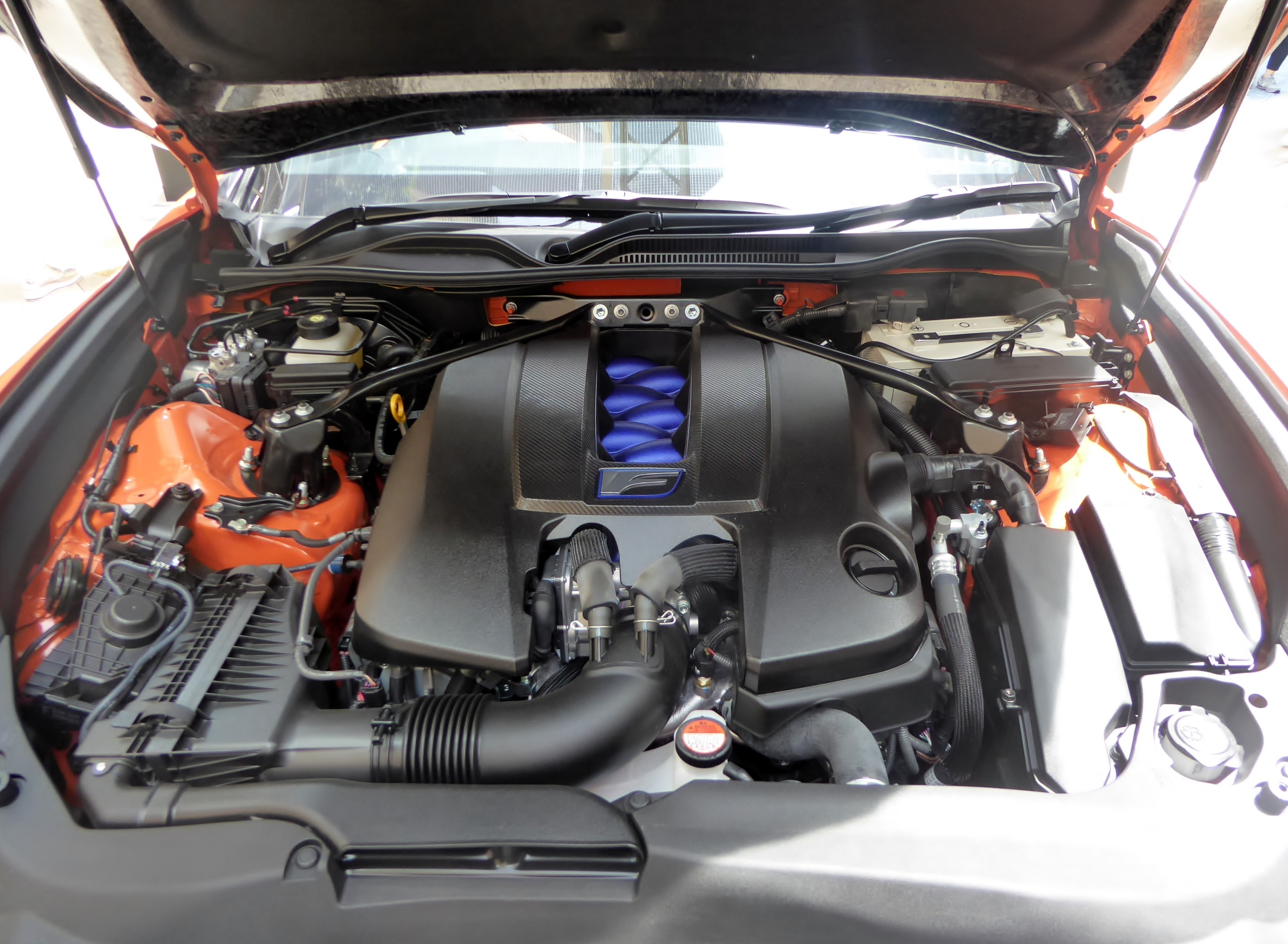 USC10型レクサス・RC F"カーボンエクステリアパッケージ"のエンジンルームを撮影。